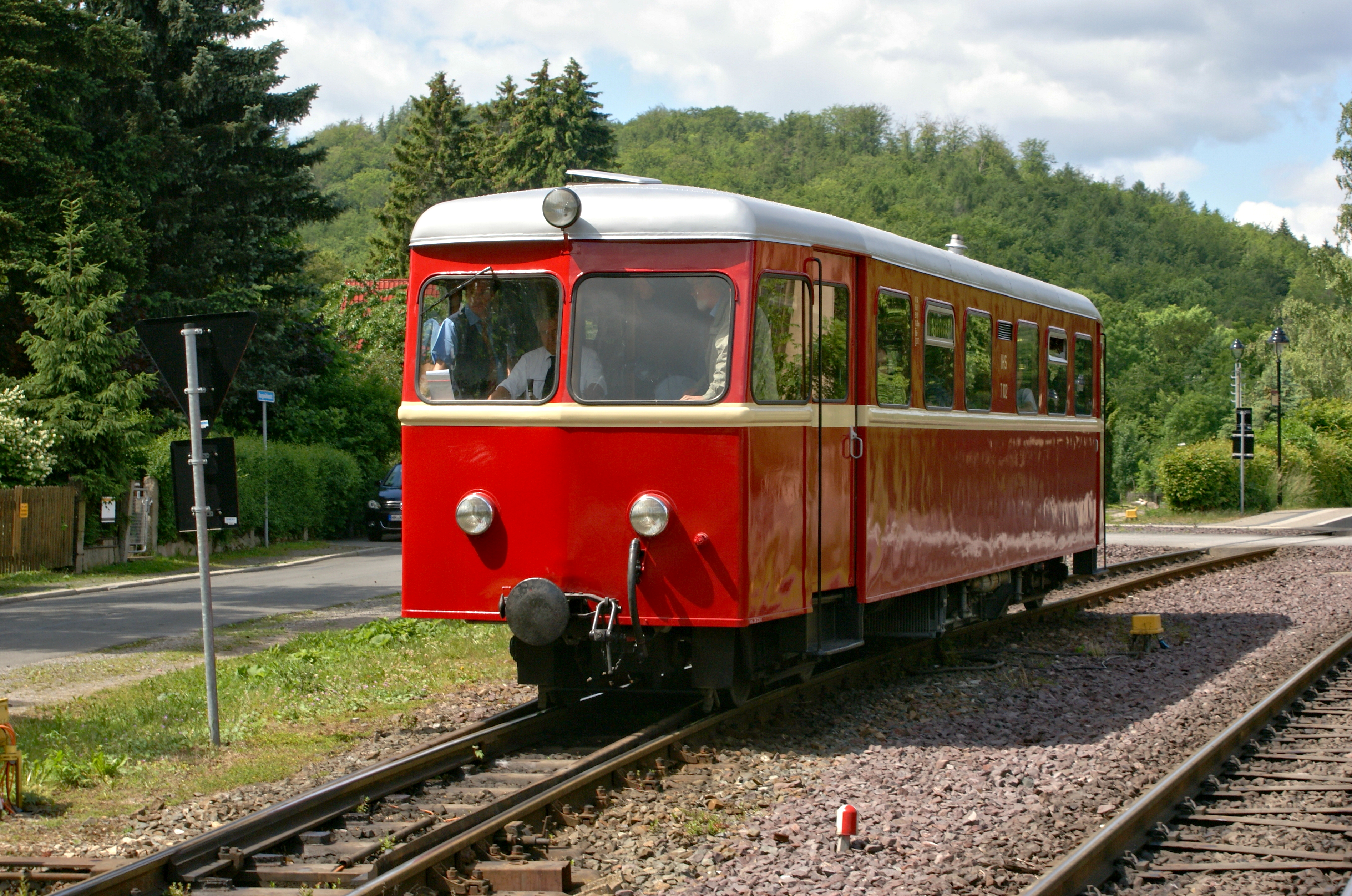 Dieseltriebwagen T 102 der IHS (ex Langeoog VT 2 ex RLE VT 6 ex EKB T 2) Talbot 94433/1950 Typ "Eifel" als Gasttriebwagen im Bahnhof Wernigerode-Hasserode der HSB am 09. Juni 2012